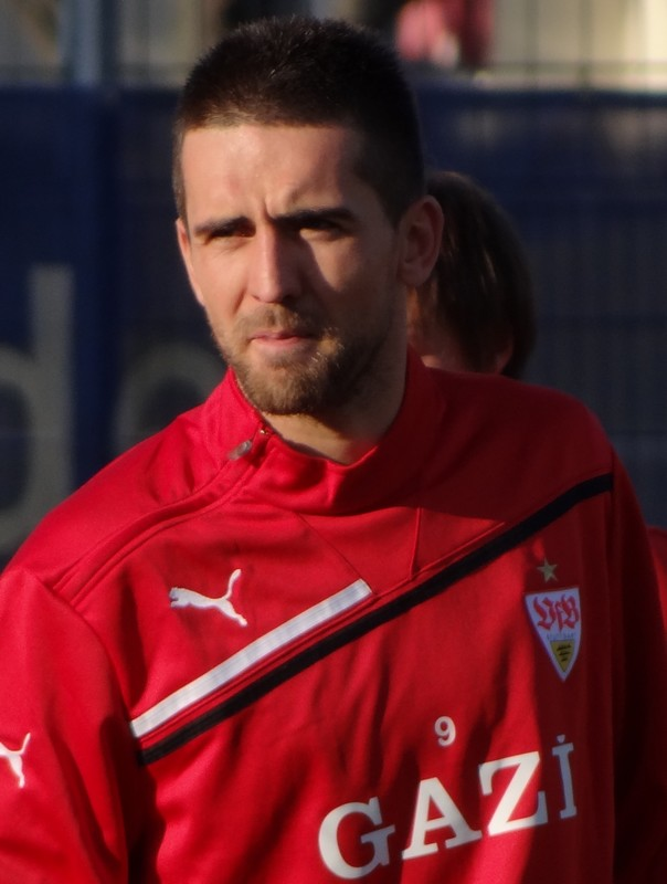 Neuzugang 2012: Ibisevic bei seinem ersten VfB-Training. Aufgenommen von